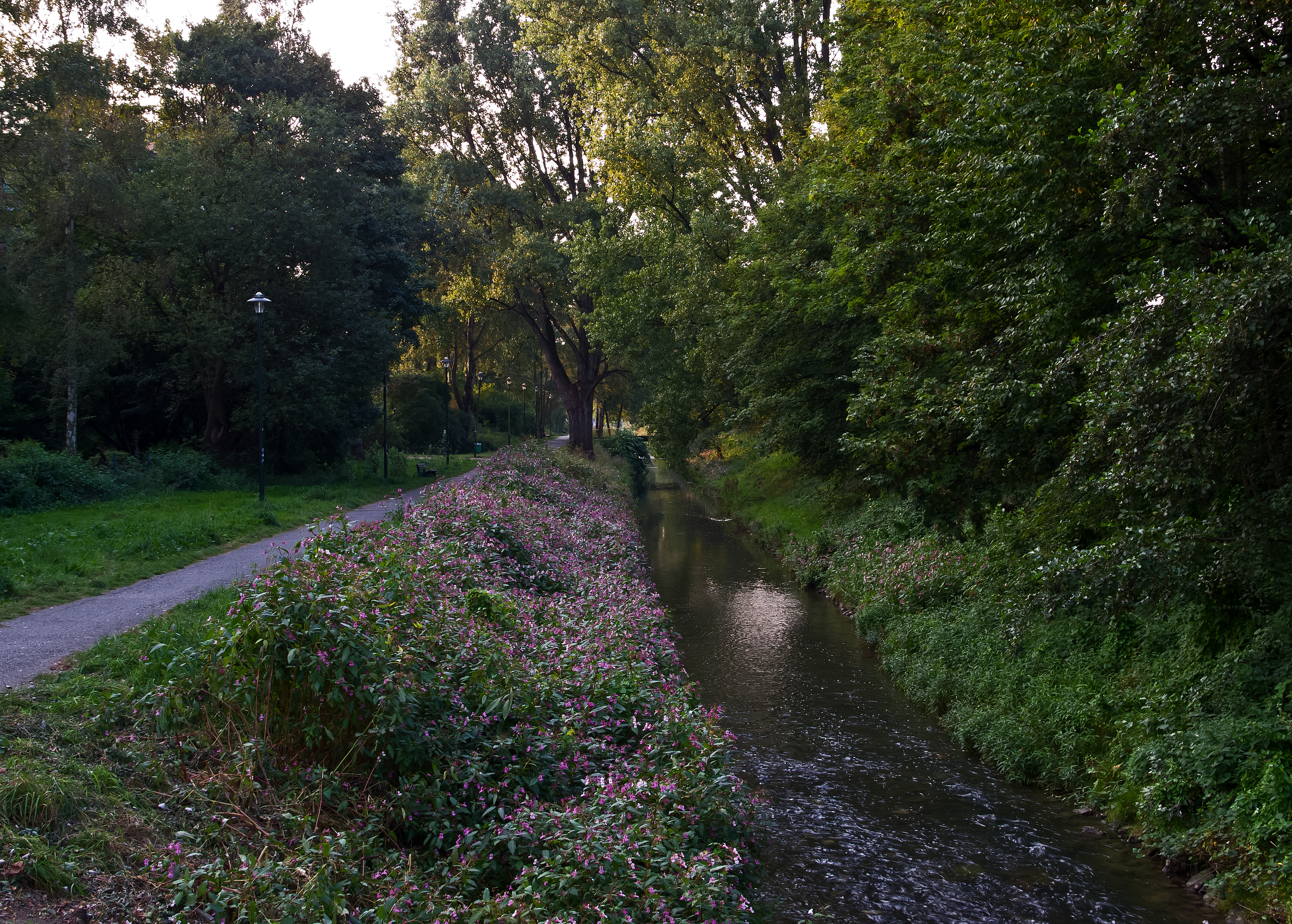 Nördliche Düssel (Düsseldorf-Gerresheim)